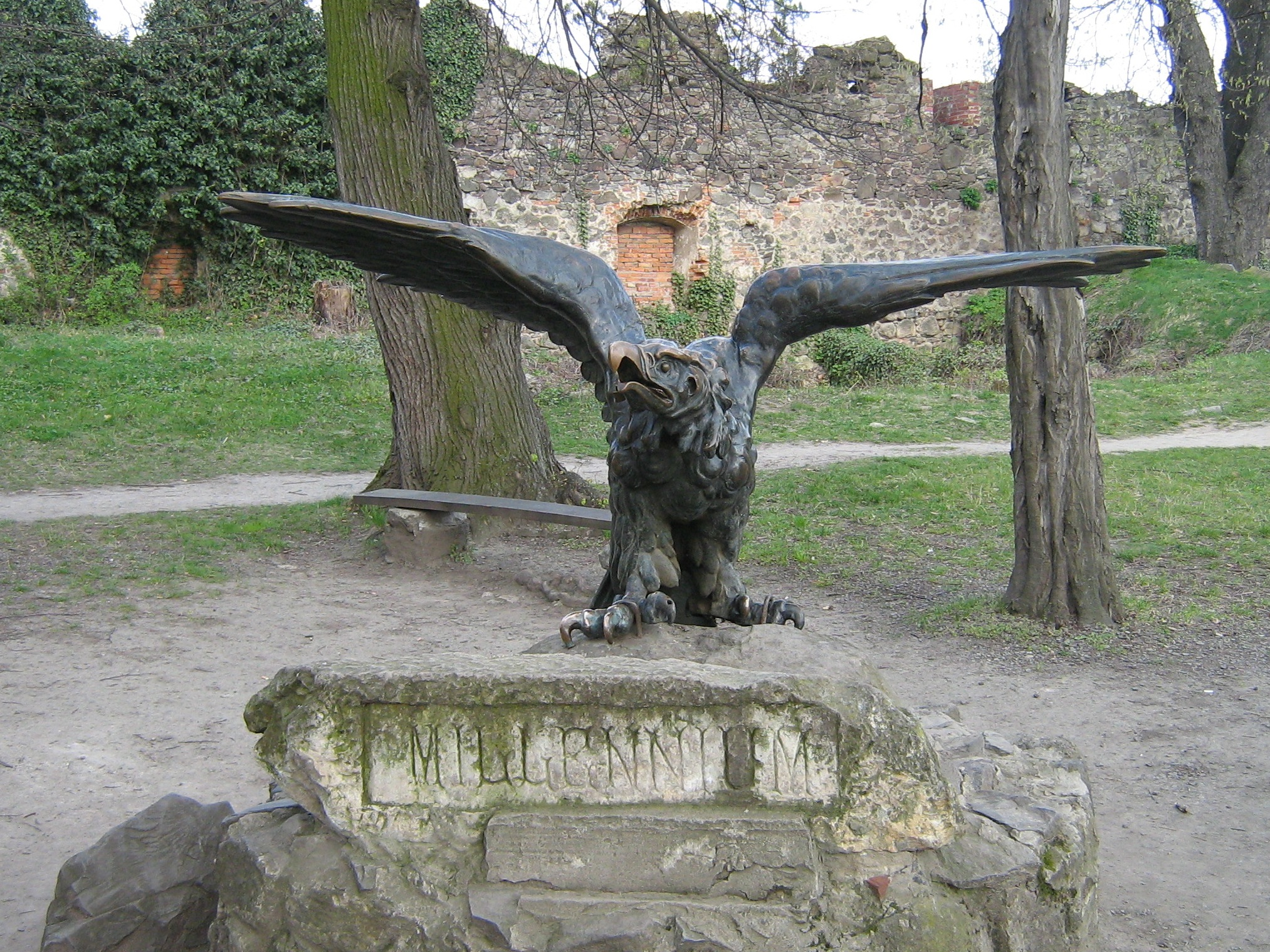 Turulszobor az ungvári vár parkjában, Kárpátalja